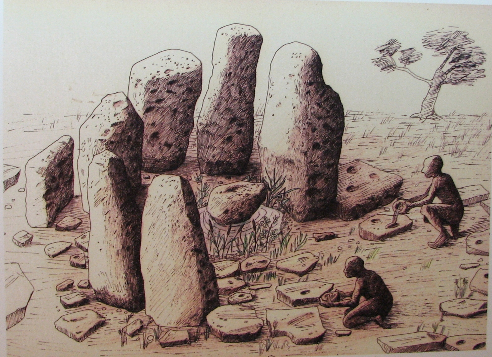 Atlit Yam is an ancient submerged Neolithic village off the coast of Atlit, Israel. The site is dated to the final Pre-Pottery Neolithic B site of Atlit Yam dates between 6900 and 6300 BC. Moshe Stekelis Museum of Prehistory exhibition in Haifa Israel The exhibition is based on the excavations and researches of the Haifa University and Antiquities Authority. Photography by Yosef Galili, Ehud Galili, Itamar Greenberg הכפר הניאוליתי בעתלית-ים שוכן בתוך הים במרחק 400 מטר מקו החוף, מערבית לשפך נחל אורן בעורפו של רכס כורכר טבוע שבהמשכו דרומה נמצא מבצר עתלית הצלבני. האתר נמצא בעומק של 12-8 מטר מתחת לפני הים. האתר מתוארך לסוף התקופה הנאוליתית קדם קרמית ב סוף האלף ה-6 לפנה"ס ממצאים מהאתר מוצגים במוזיאון לפרהיסטוריה ע"ש משה שטקליס בחיפה הנמצא בתוך גן החיות במרכז הכרמל התערוכה מבוססת על חפירות ומחקרים שהתבצעו על ידי אוניברסיטת חיפה ורשות העתיקות הצילומים מהחפירות המוצגים בתערוכה צולמו על ידי יוסקה גלילי, אהוד גלילי ואיתמר גרינברג מבנה פולחני שנמצא באתר – ציור המשחזר את המבנה